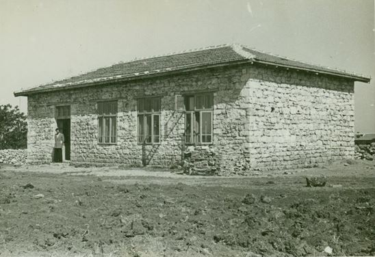 Начално училище в село Свети Никола, Добричко.